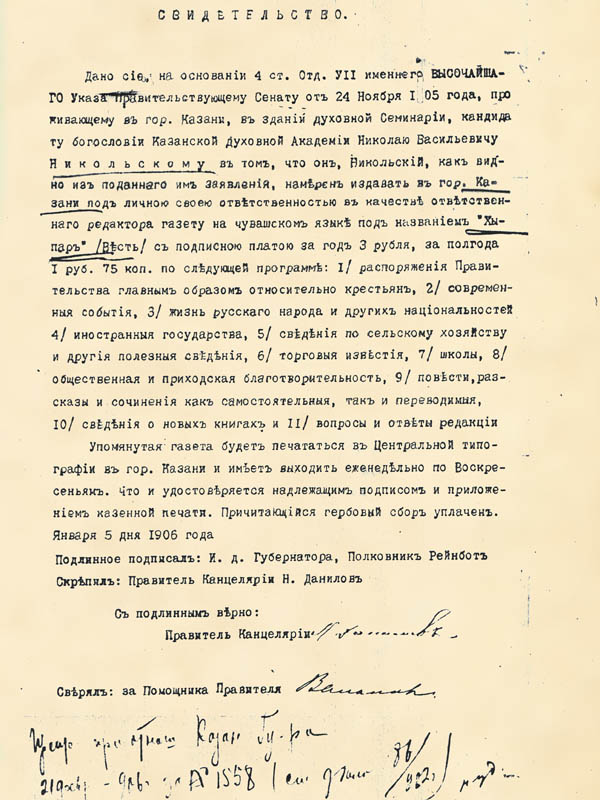 Копия разрешения на издательство газеты Хыпар от 5 января 1905 года